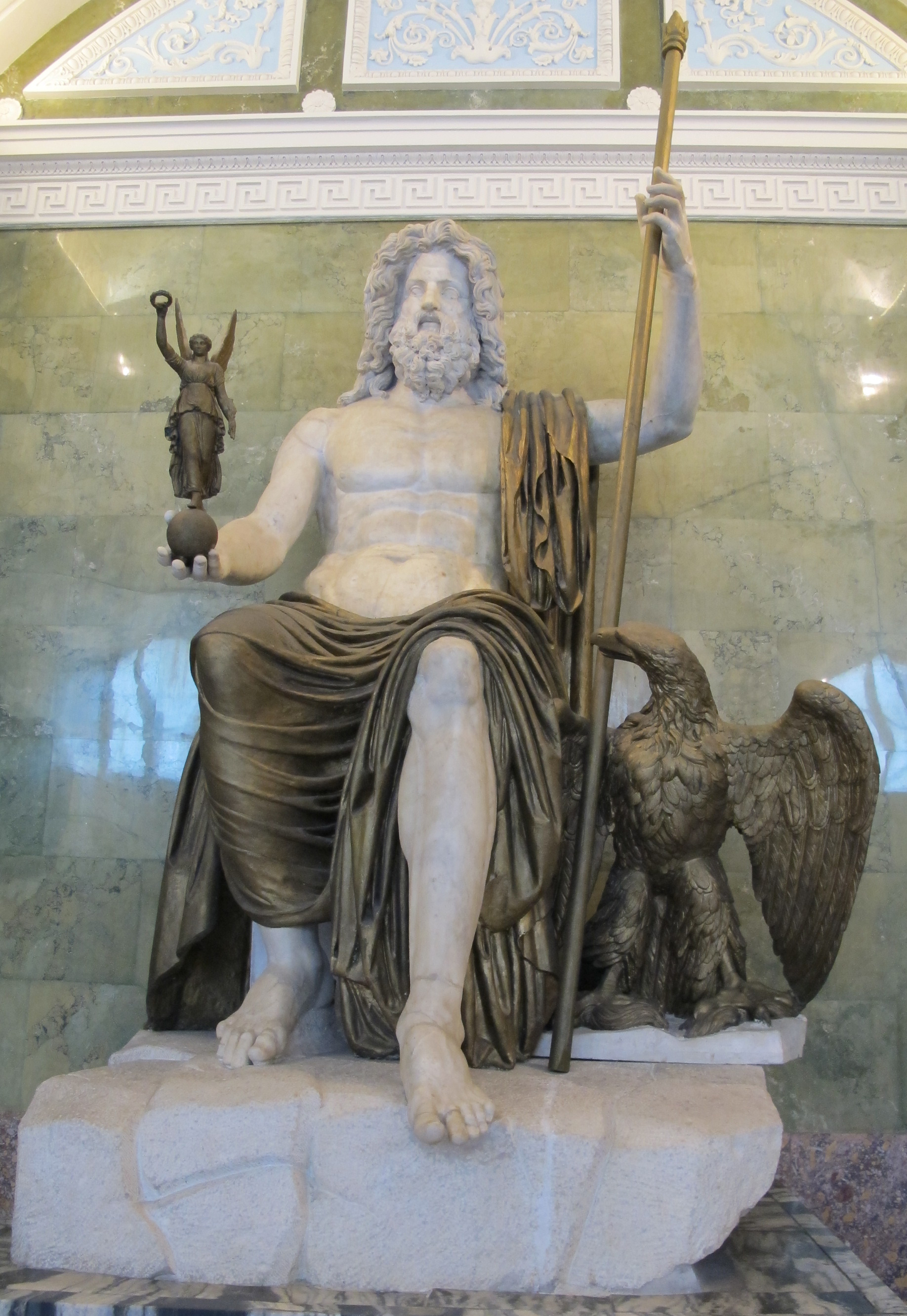 Giove, I sec dc, con parti simulanti il bronzo moderne